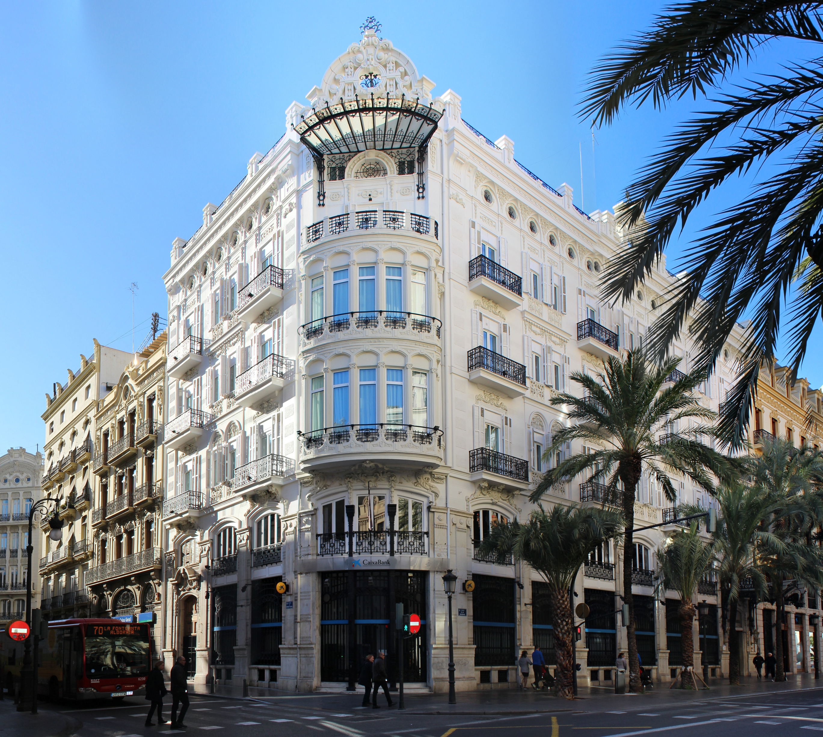 Hotel Reina Victoria (1910) de Luis Ferreres Soler en la calle de las Barcas número 4, esquina con calle Pérez Pujol en Valencia